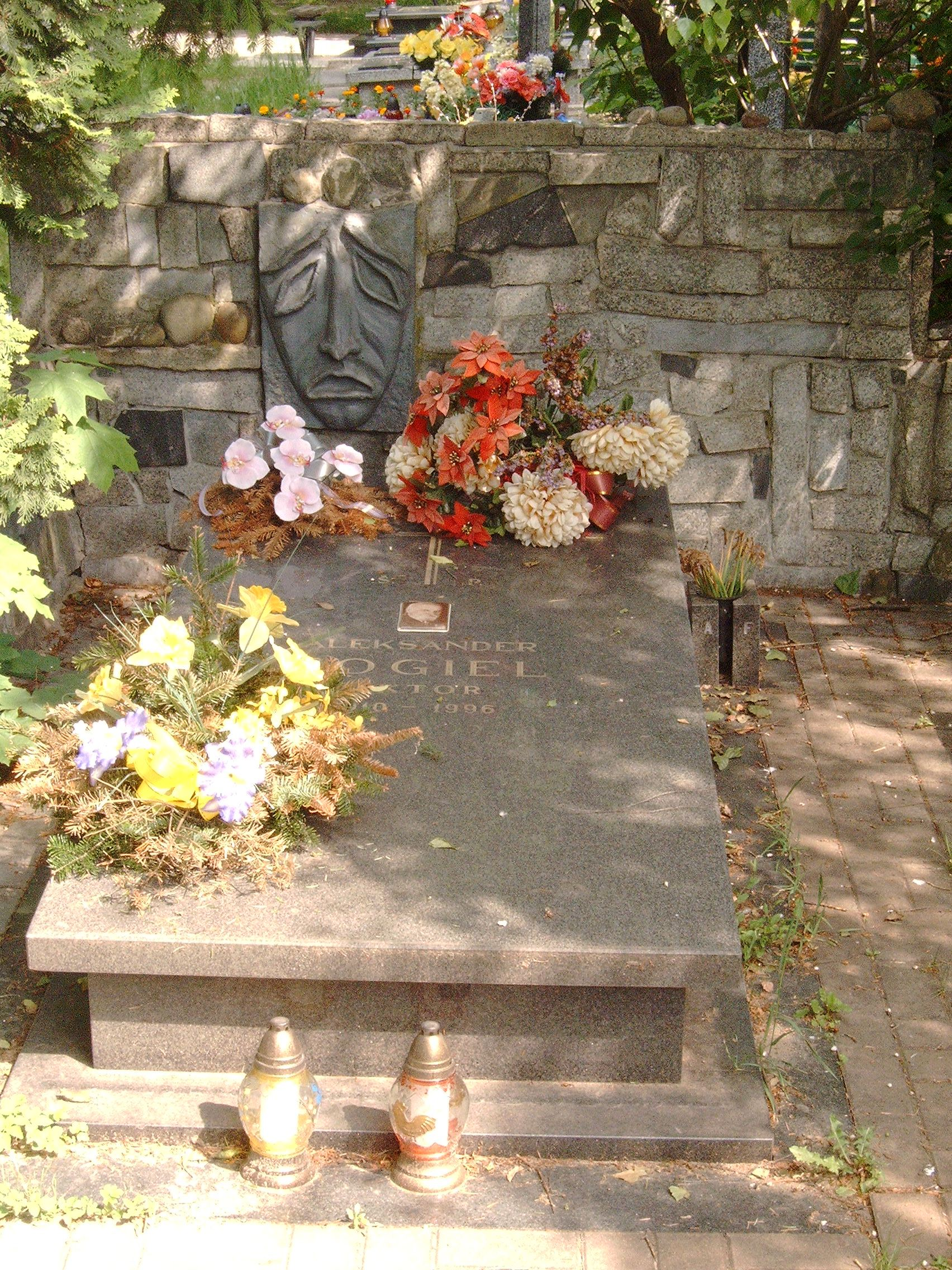 Grób Aleksandra Fogla na cmentarzu komunalnym na Dołąch w Łodzi